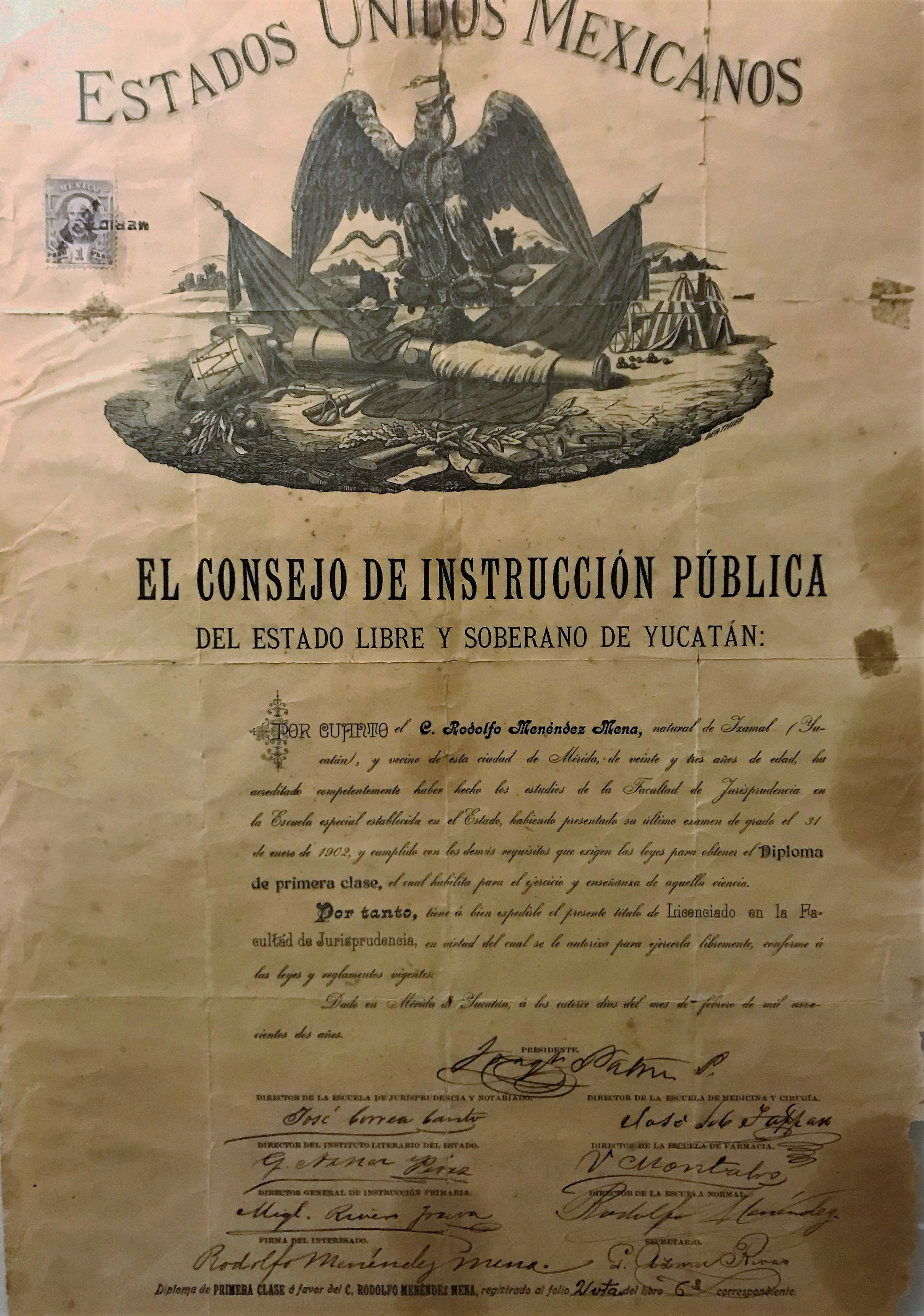 Título de Rodolfo Menendez Mena. Archivo General de la Nación